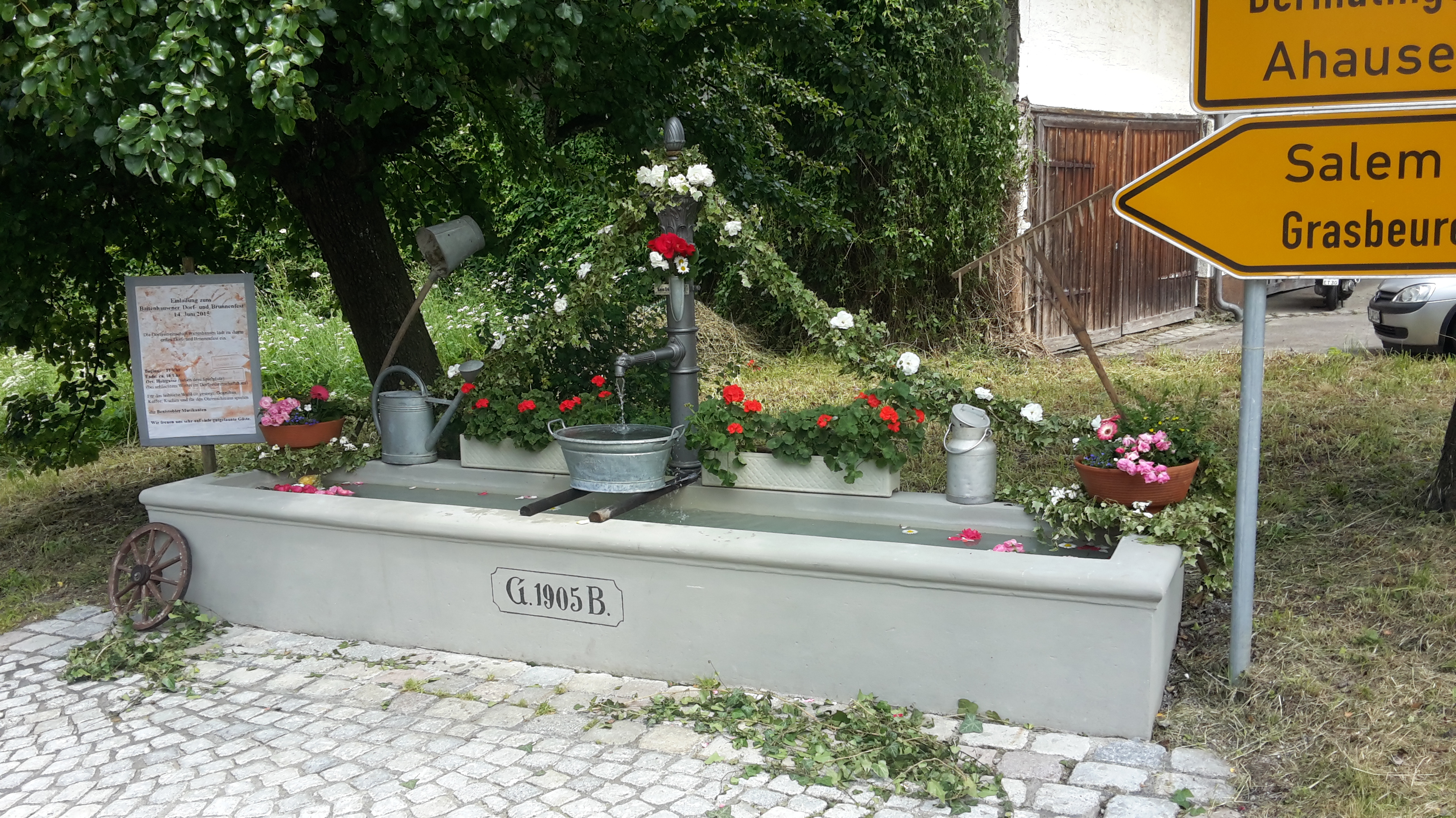 Geschmückter Brunnen für das erste Dorf- und Brunnenfest 2015 zum 110 Jährigem Jubiläum des Brunnens.